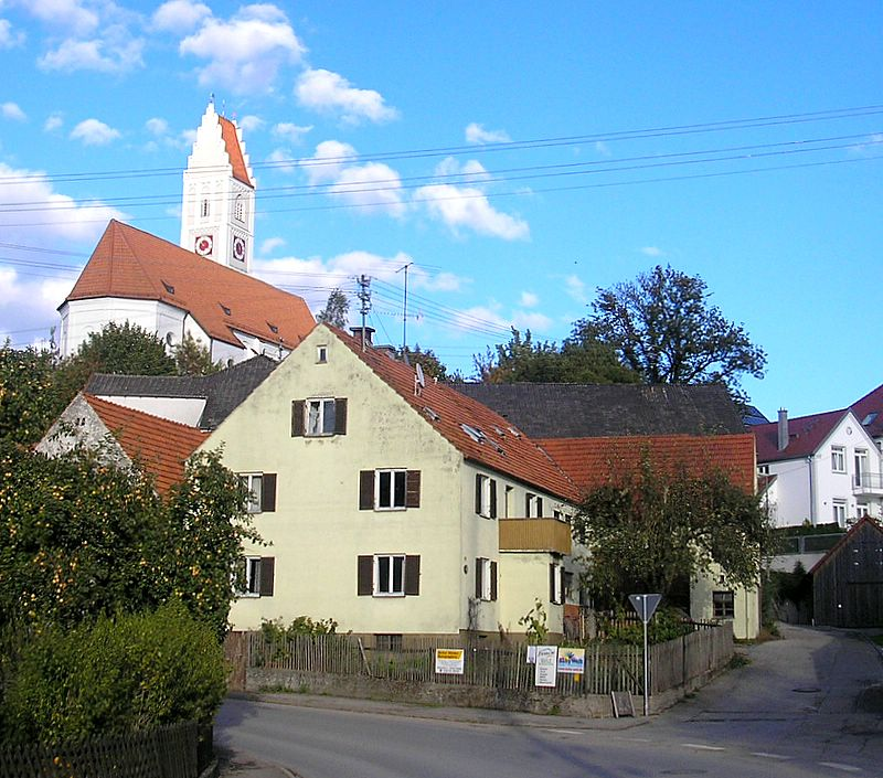 Pfarrkirche St. Stephan (Kissing, Landkreis Aichach-Friedberg, Bayerisch-Schwaben). Ansicht von Westen. Eigene Aufnahme, Okt. 2006. / Parish church St. Stephen at Kissing near Augsburg (Bavaria, Germany). View from the east. Own photo, Oct. 2006